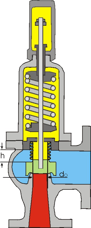 Überströmventil, eigene Zeichnung